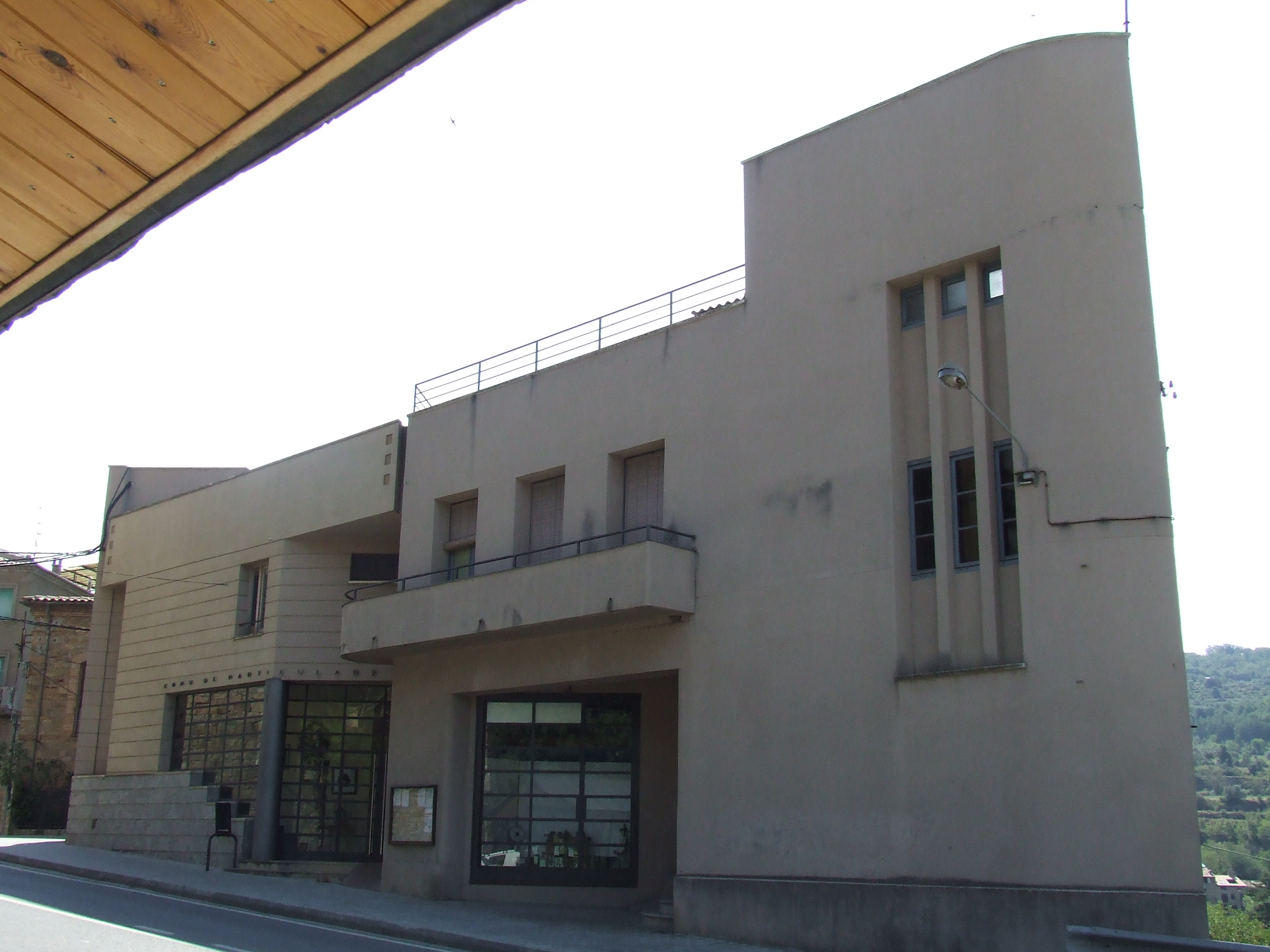 El Comú de Particulars (la Pobla de Segur, Pallars Jussà)